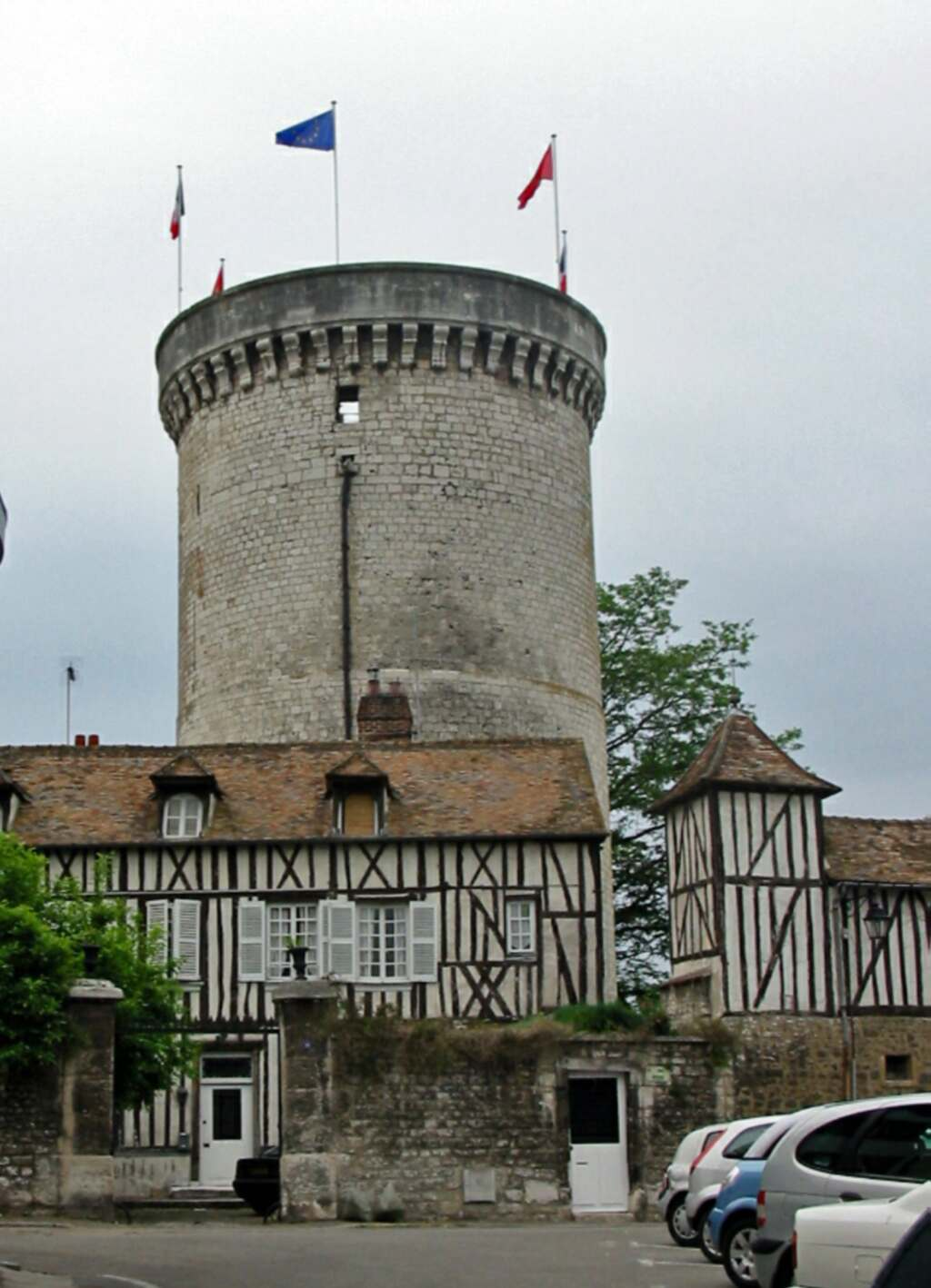 La tour des archives à Vernon (Eure, France) Photo JH Mora, mai 2005